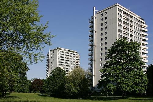 Wohnsiedlung Rheinpark in Birsfelden